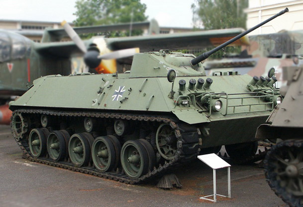 Schutzenpanzer Lang HS.30 - based on Image:Bundeswehrmuseum_Dresden_58.jpg - original GDFL - so thus this GDFL. Bundeswehrmuseum Dresden mit Teilen von der NVA Remark: Rockwell OV-10 Bronco & Schützenpanzer lang (HS-30). Source: Jan Rehschuh